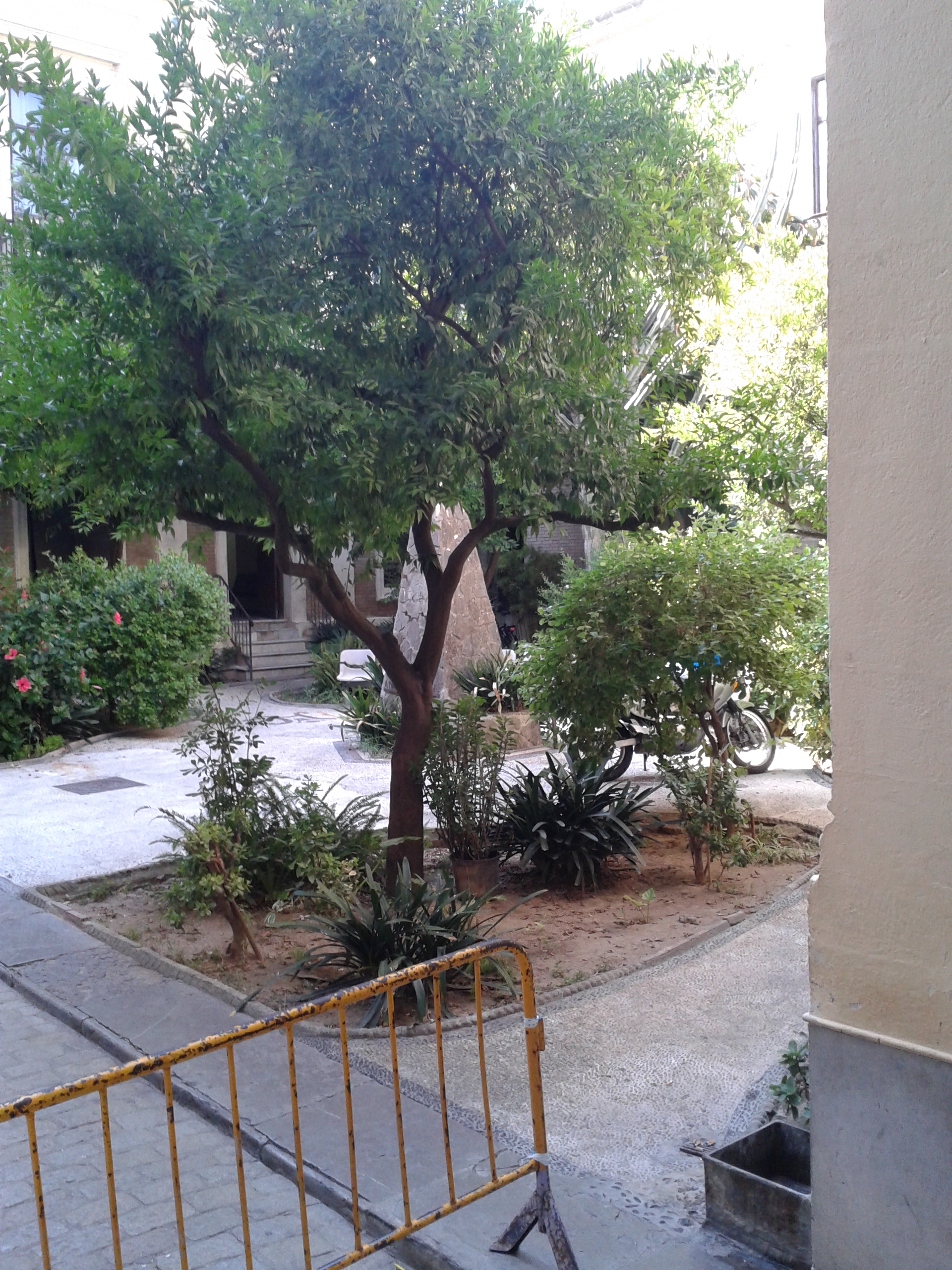 patio Policía Nacional Jerez